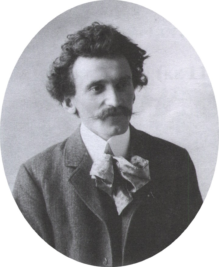 Malíř Václav Šrámek